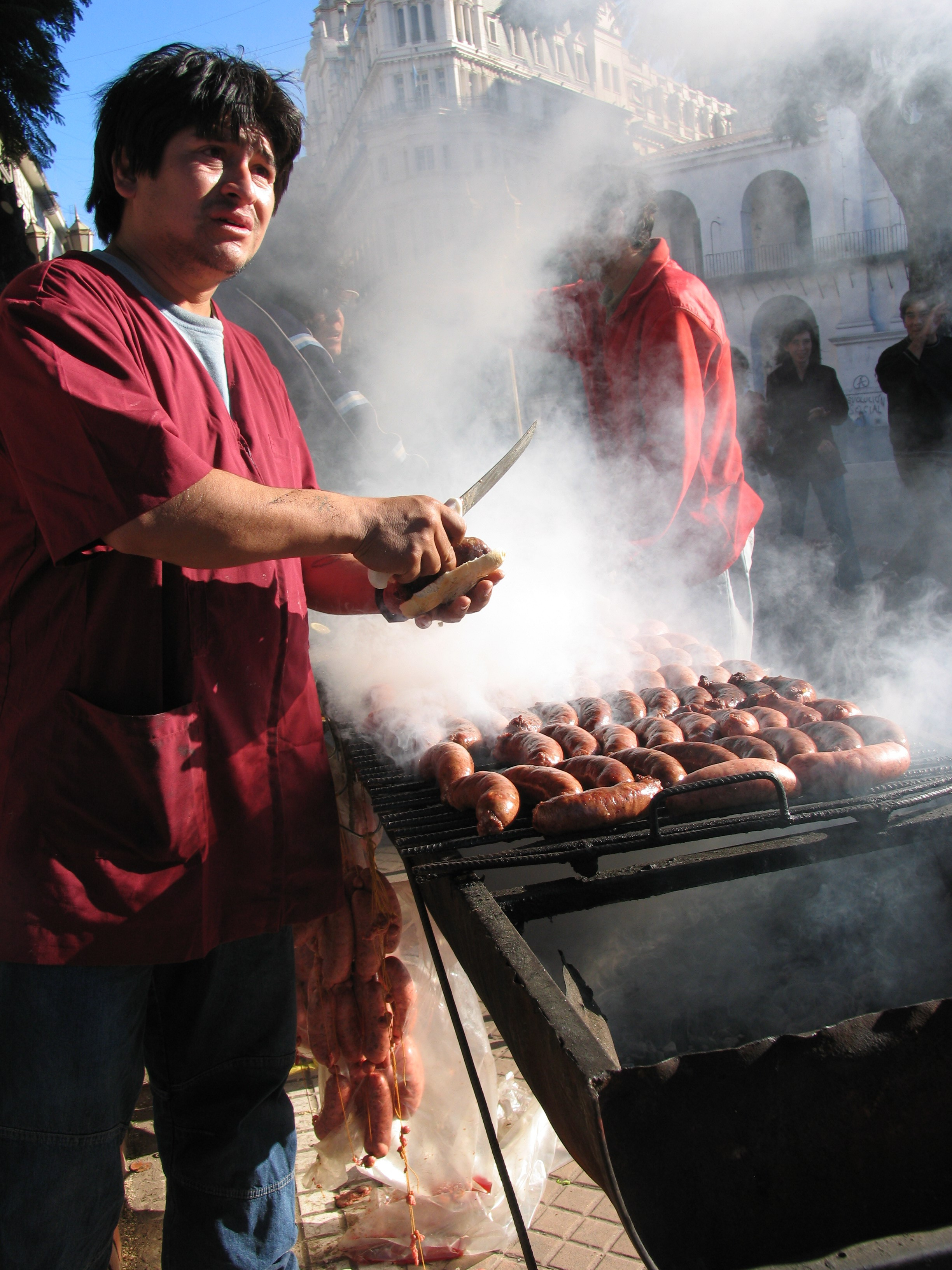 Puesto de venta de choripanes durante una manifestación, Plaza de Mayo, Buenos Aires, Argentina. El vendedor tiene en sus manos un choripán, comida que se compone de un chorizo asado recubierto por un trozo de pan. En la Argentina se trata de una comida que se vende tradicionalemente en la calle cuando se realizan espectáculos deportivos, musicales, ferias o grandes manifestaciones.